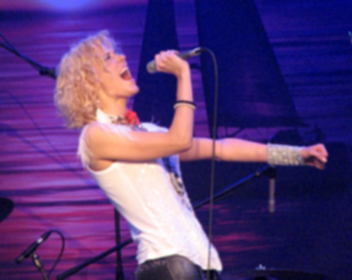 Ithaka Maria esinemas Õllesummeril.